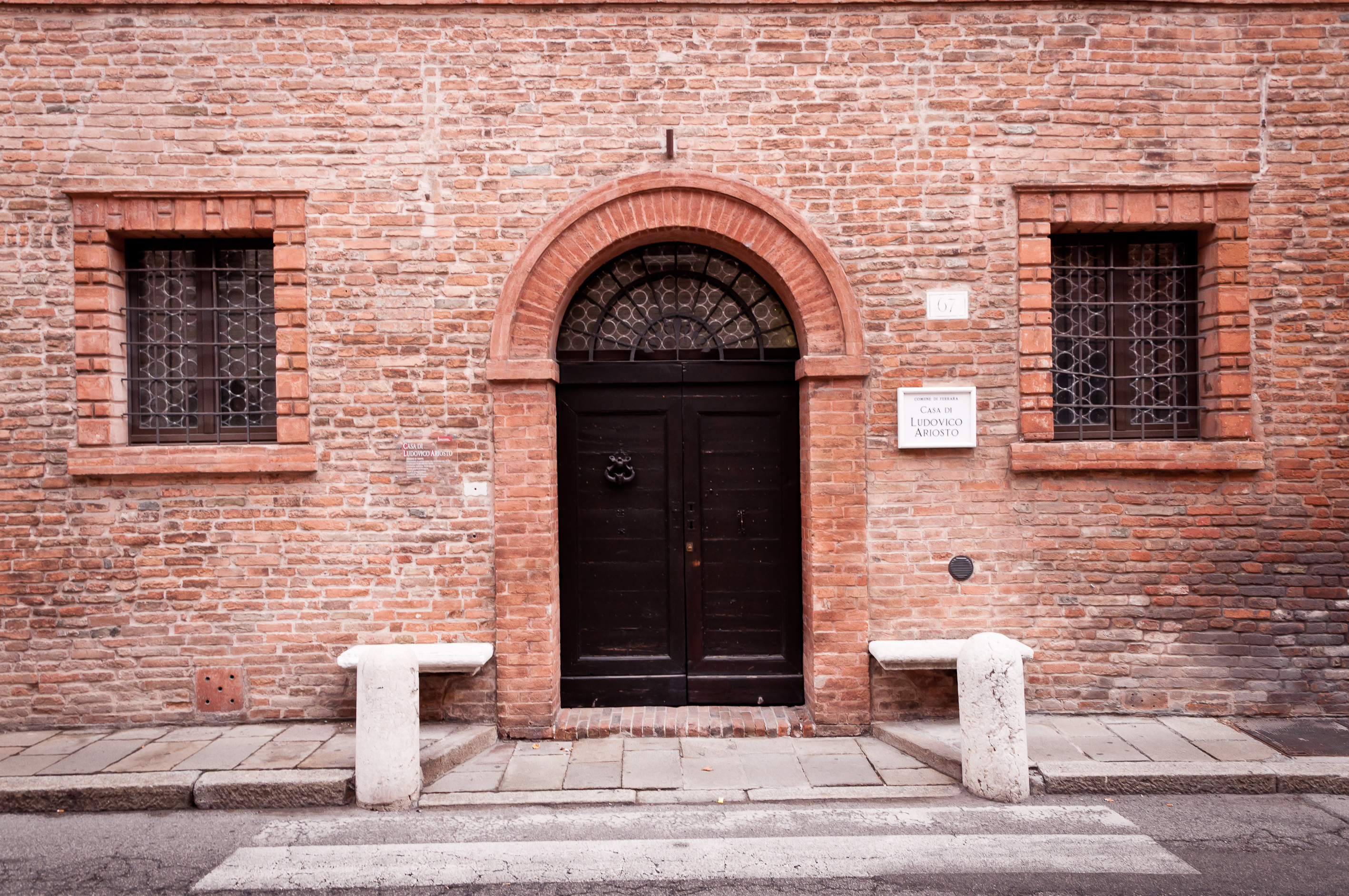 Casa di Ludovico Ariosto This is a photo of a monument which is part of cultural heritage of Italy.